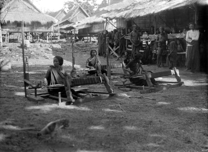 Negatief. Wevende vrouwen op het eiland Sangéang, Timor